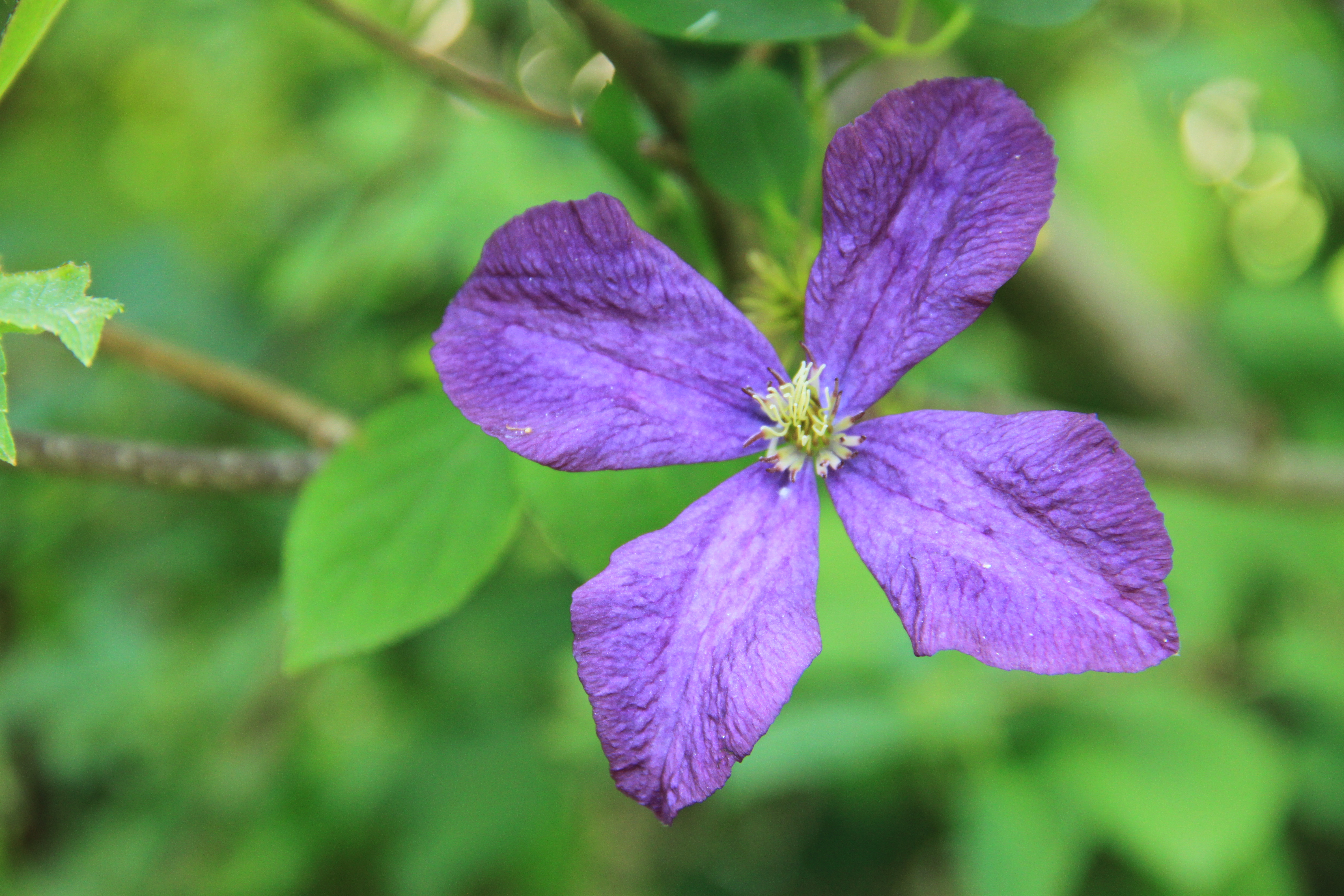 Fleur dans le jardin du musée de l'école de Nancy